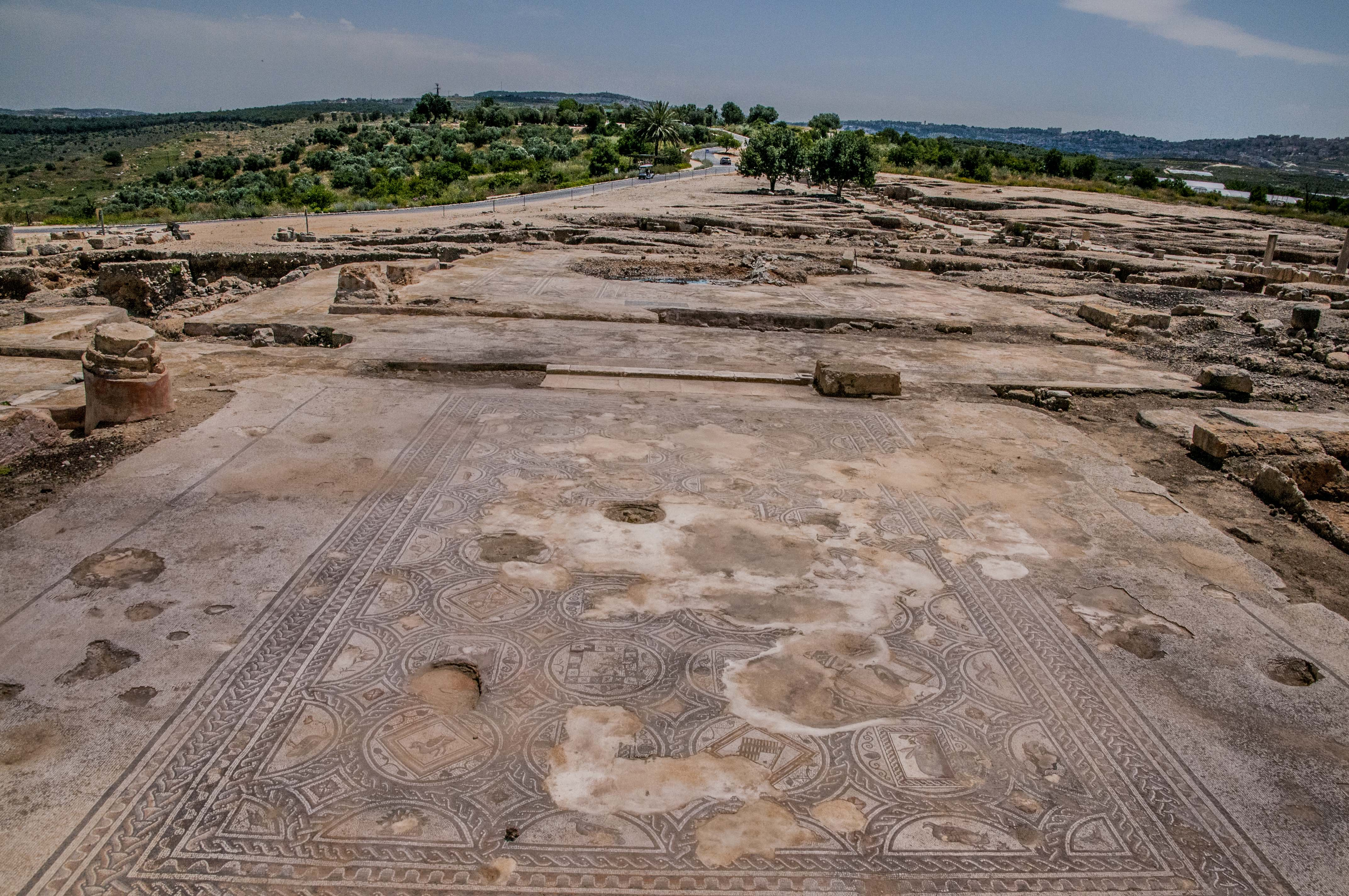 צִיפּוֹרִי הייתה עיר עתיקה במרכז הגליל התחתון, חמישה קילומטרים מצפון מערב לנצרת. יישוב היה קיים במקום כבר בתקופת הברזל II, ועיר יהודית התקיימה בו מתקופת החשמונאים ועד המאה ה-5 לספירה, כאשר יהודים ישבו באזור עד המאה ה-10. אתר ציפורי הוא גן לאומי המשתרע על שטח של כ-16 קמ"ר. הגן נפתח לציבור בשנת 1992. החפירות בגן טרם הסתיימו.